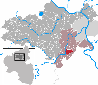 Gemeinde Alken im Landkreis Mayen-Koblenz